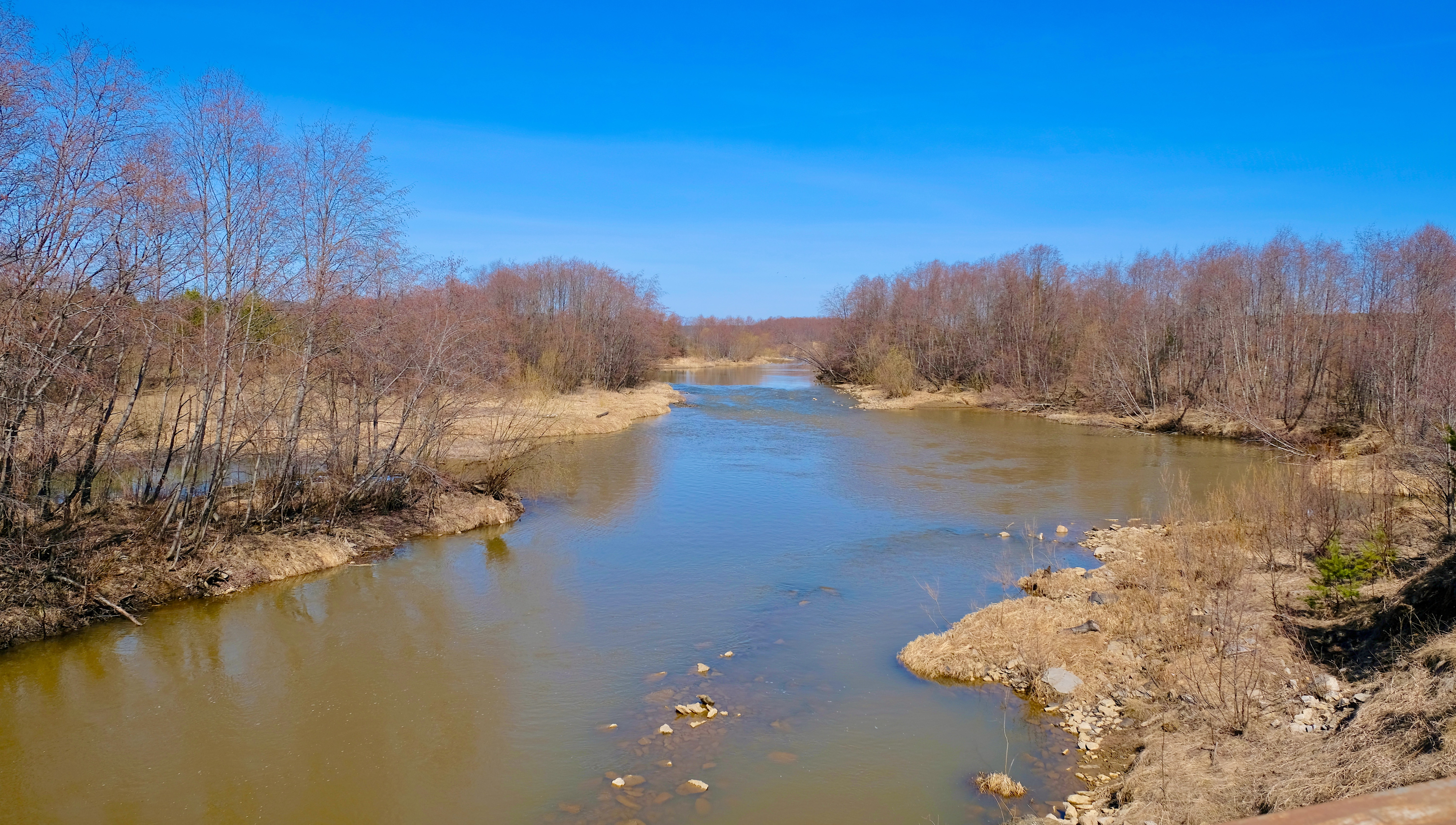 Река Ис ниже посёлка Ис